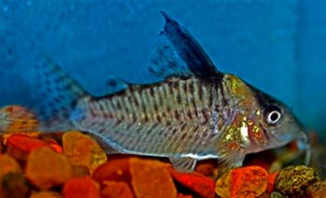 Corydoras delphax